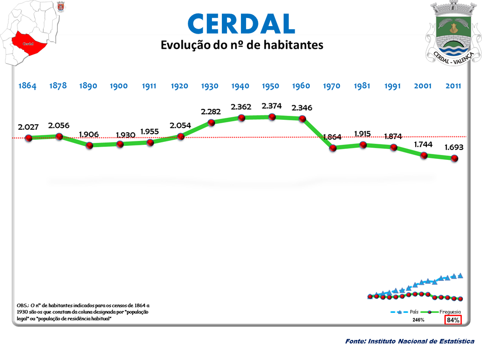 Censos 1864/2011